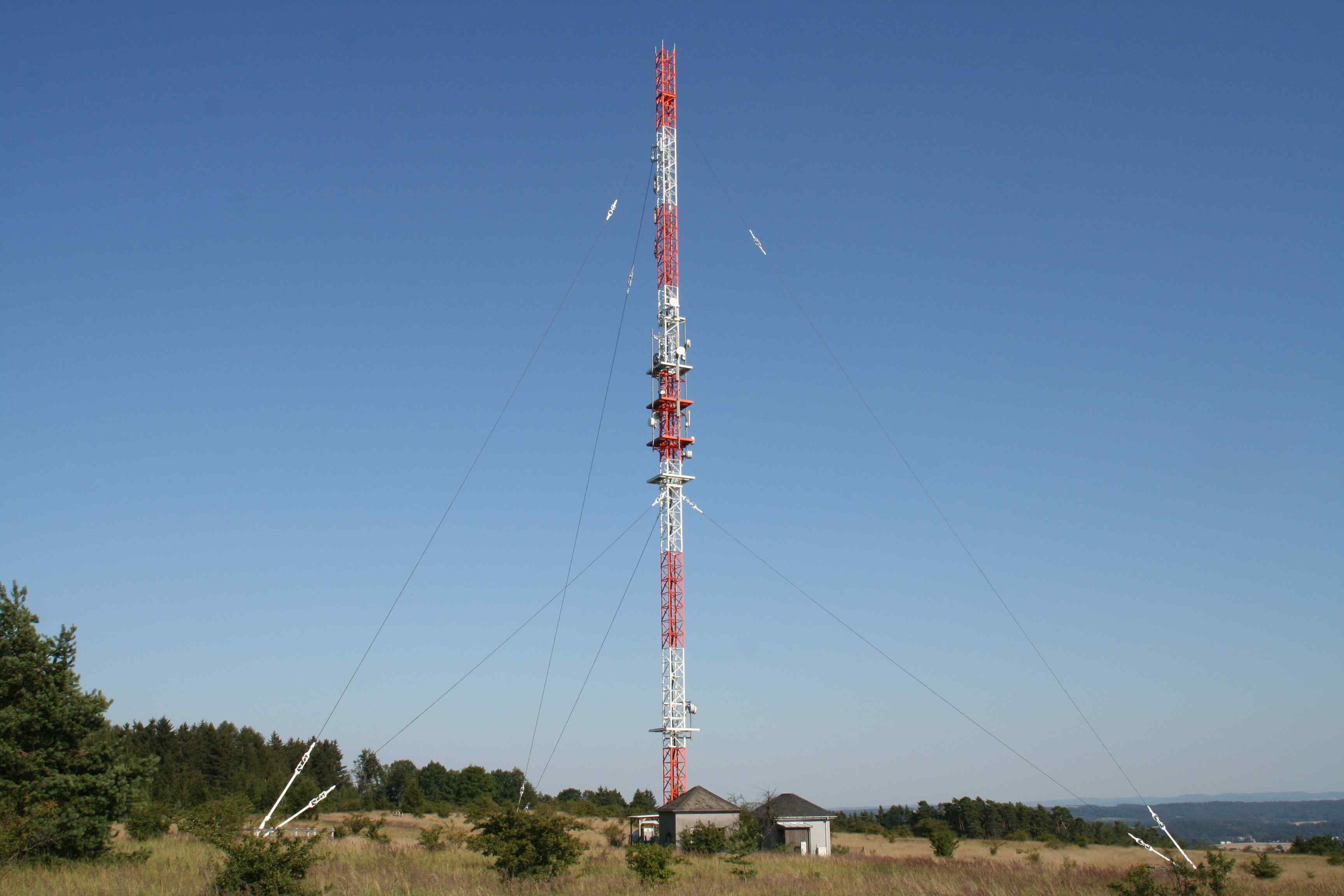 Decca-Sender-Lautertal im NSG Lauterberg